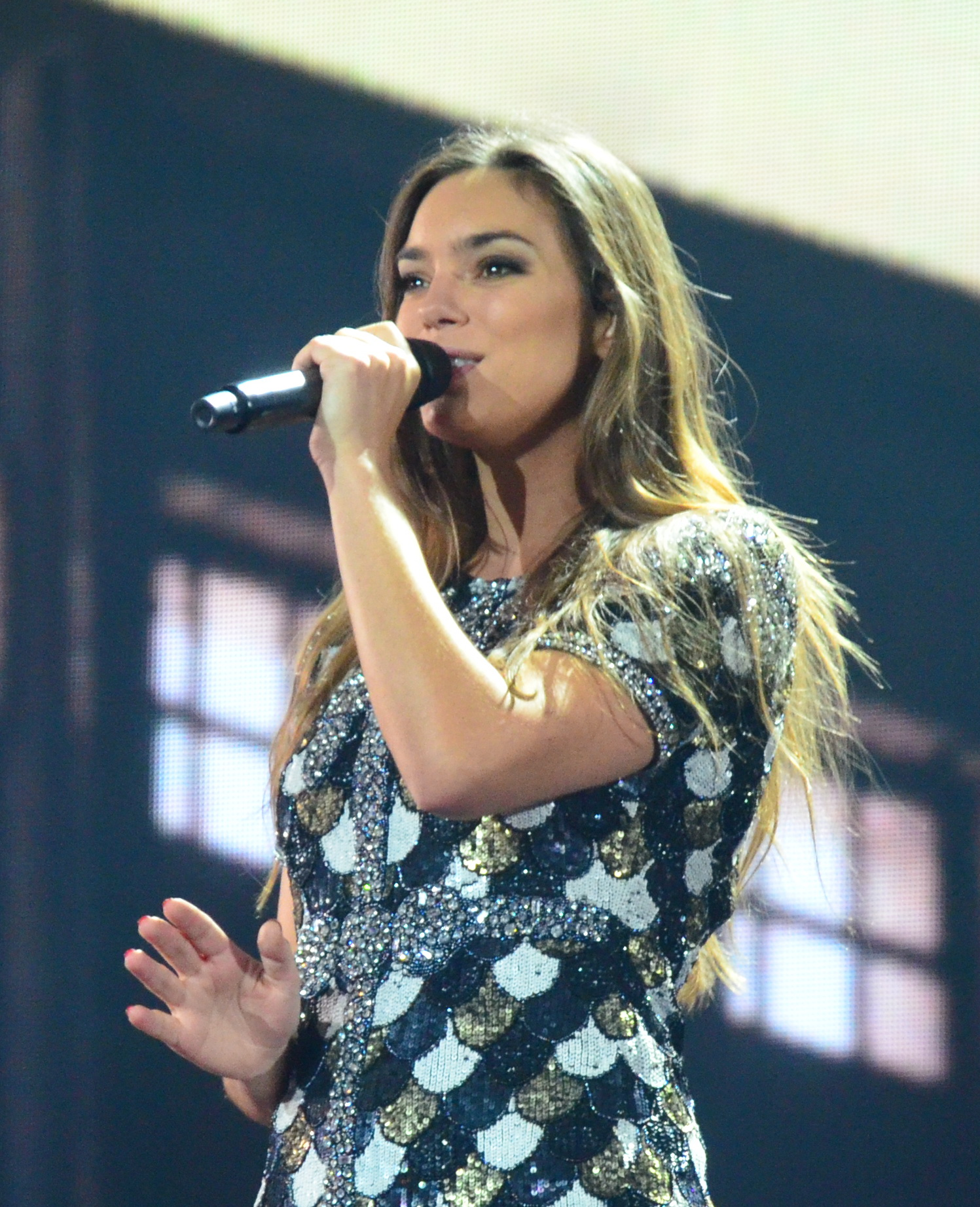 10 травня 2017 року у Києві відбулась генеральна репетиція 2 півфіналу "Євробачення".